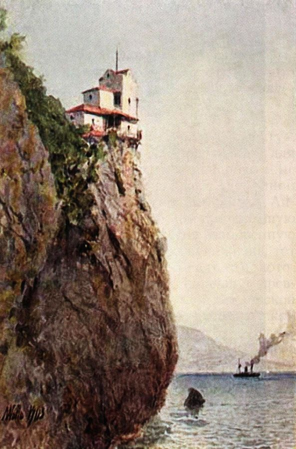 Крым. Ласточкино гнездо. 1903